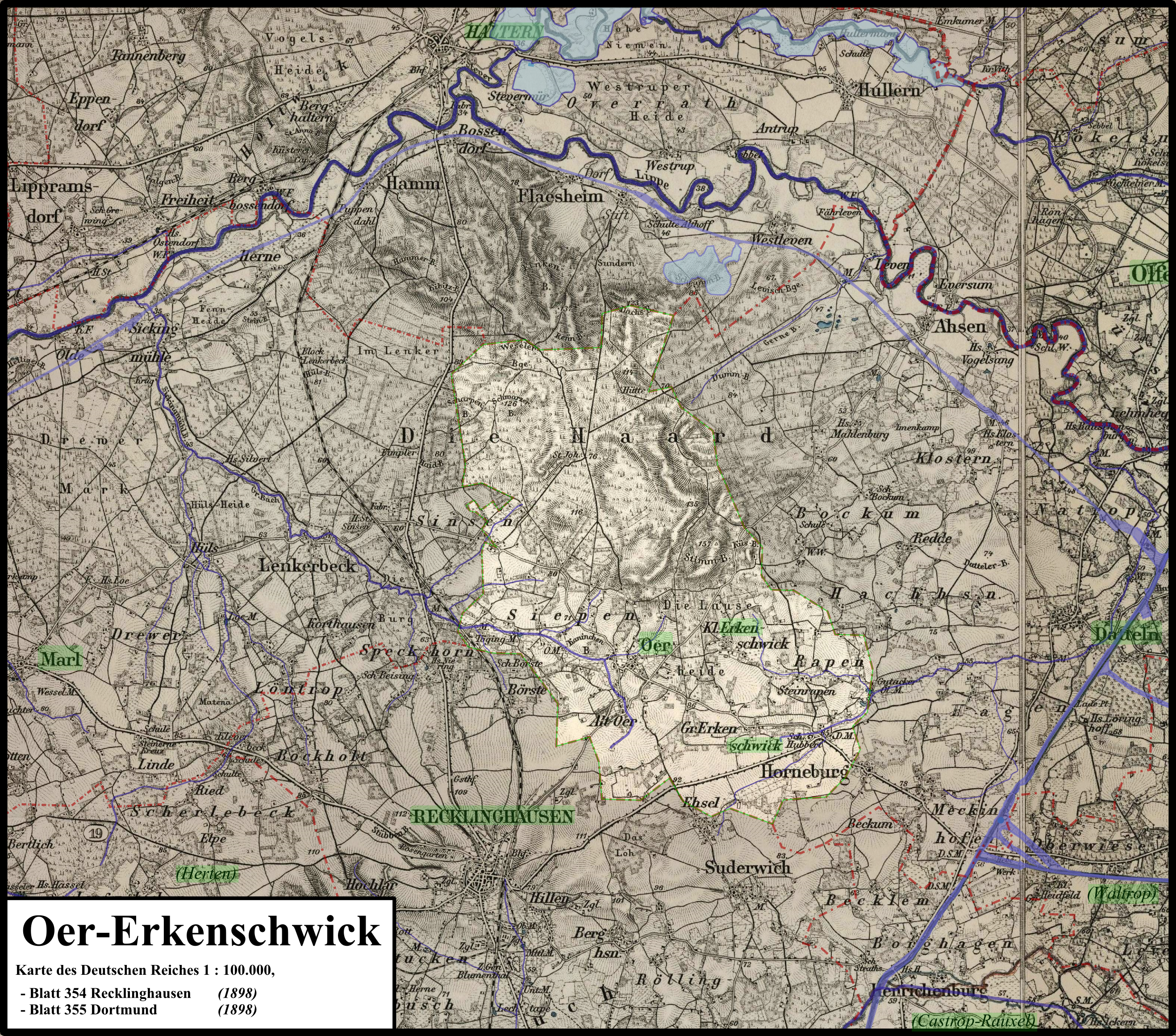 Karte der Stadt Oer-Erkenschwick auf Basis der Karte des Deutschen Reiches| 1 : 100.000, Ende des 19. Jahrhunderts;Verwaltungsgrenzen (rot), Kanäle, Flüsse und Seen entsprechen dem heutigen Stand/Verlauf; heutige Stadtnamen sind hellgrün hervorgehoben (damalige Stadtnamen in Großbuchstaben), aufgehellt und hellgrün umgrenzt ist die heutige Stadt Oer-Erkenschwick.